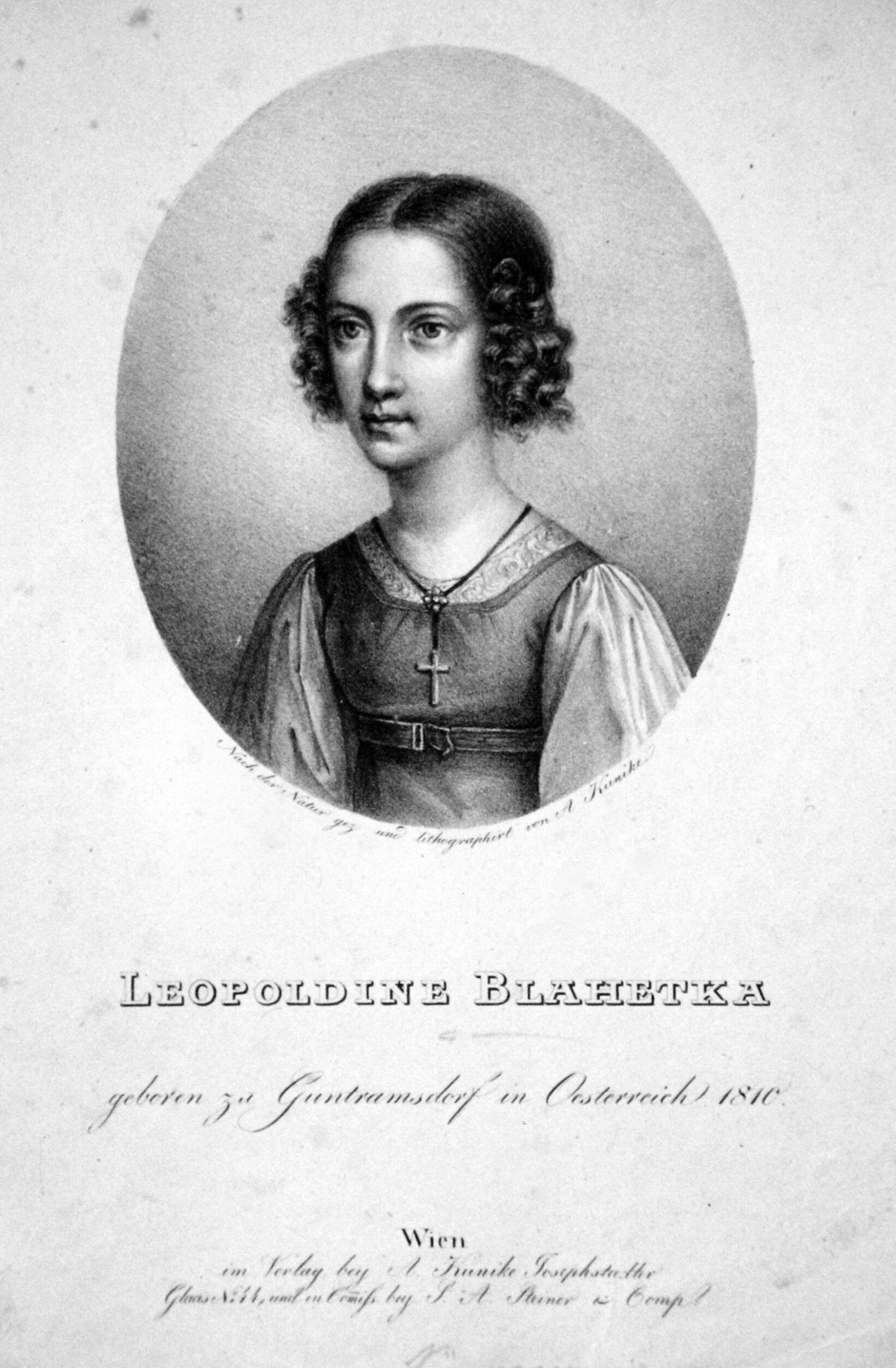 Leopoldine Blahetka, Porträtlithographie von Adolph Friedrich Kunike